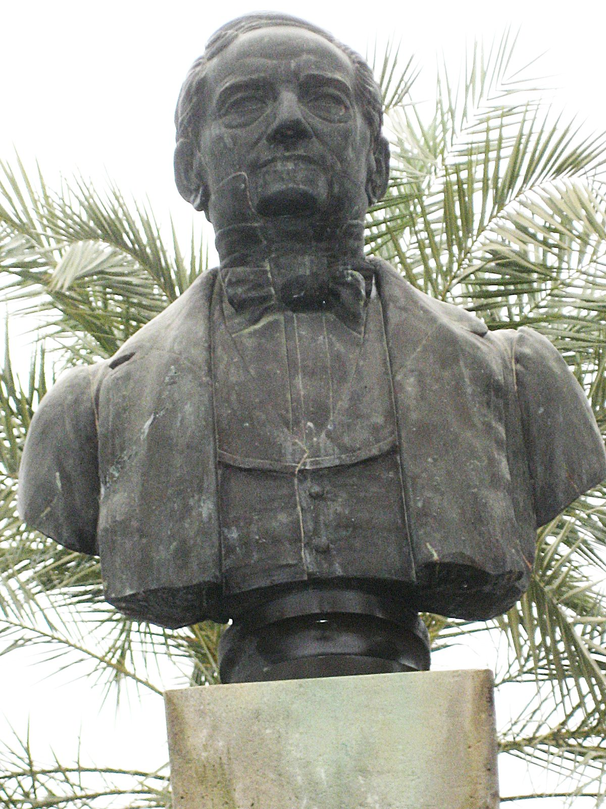 Busto de Rafael Rivero de la Tixera realizado por José Luis Jiménez